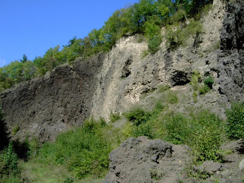 Geologischer Aufschluss am alten Steinbruch Karmelenberg, Naturschutzgebiet „Karmelenberg“ in Bassenheim